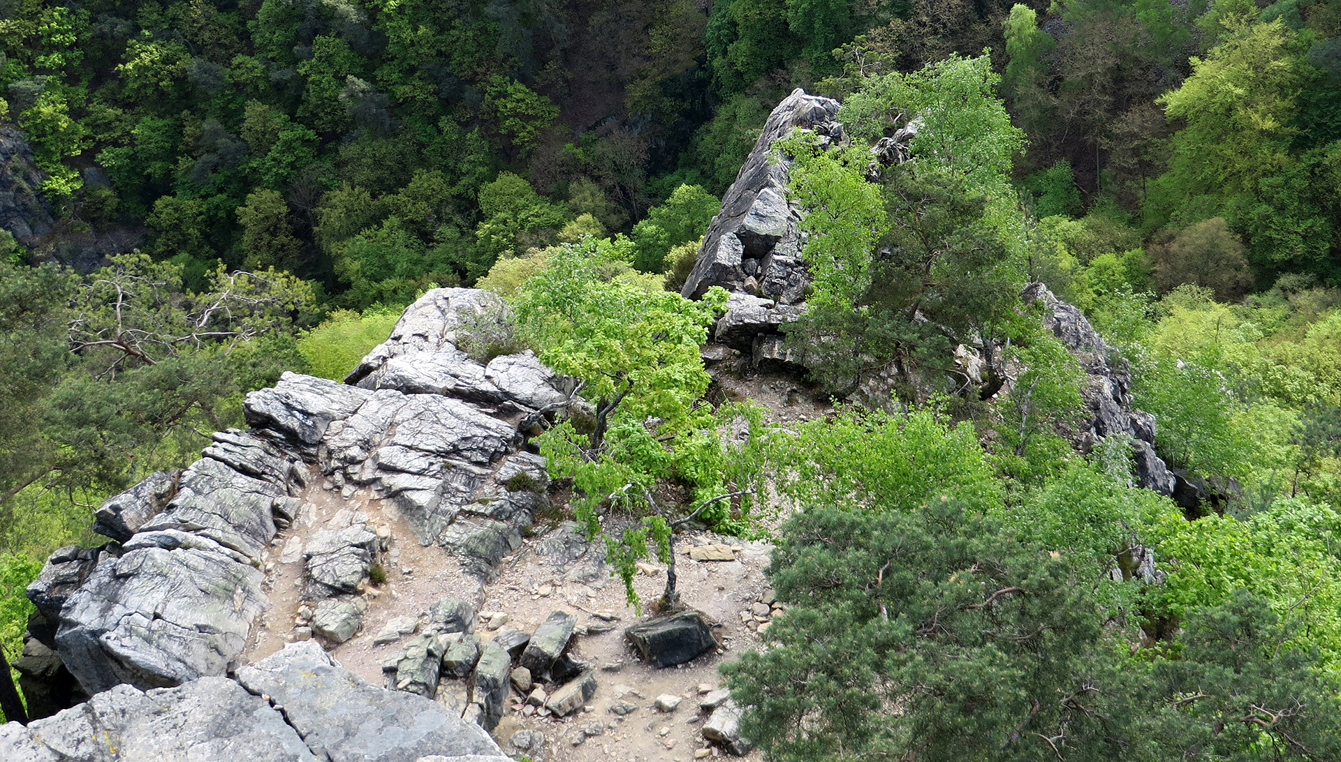 Morgenbachtal: Klettergebiet am Rhein, in der Nähe von Bingen am Rhein (Info: der Bereich liegt im Landkreis Mainz-Bingen und im LSG „Rheingebiet von Bingen bis Koblenz“ (LSG-71-1); je nach konkreter Lage eventuell auch im NSG „Morgenbachtal“